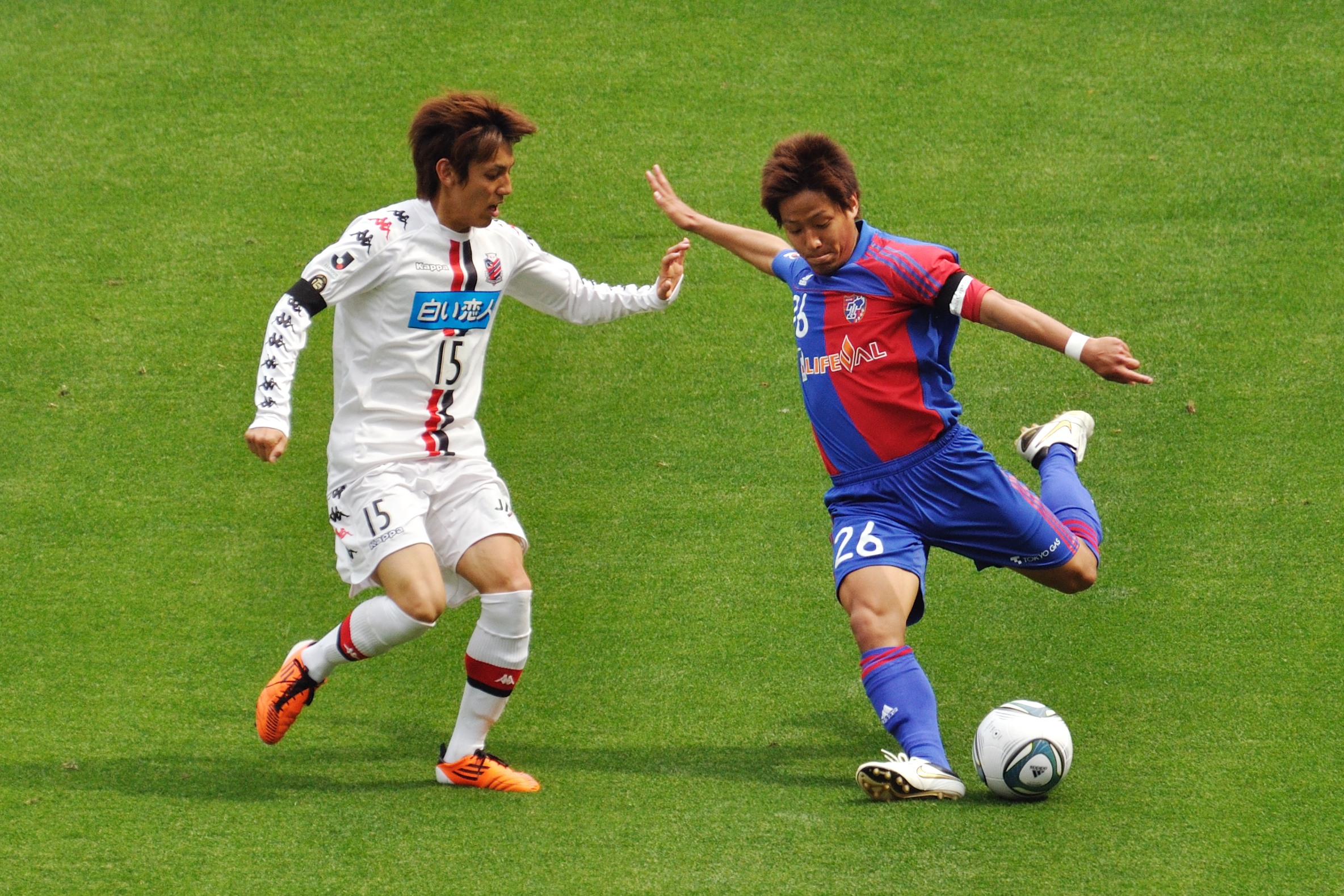 Hiroyuki Furuta and Takumi Abe